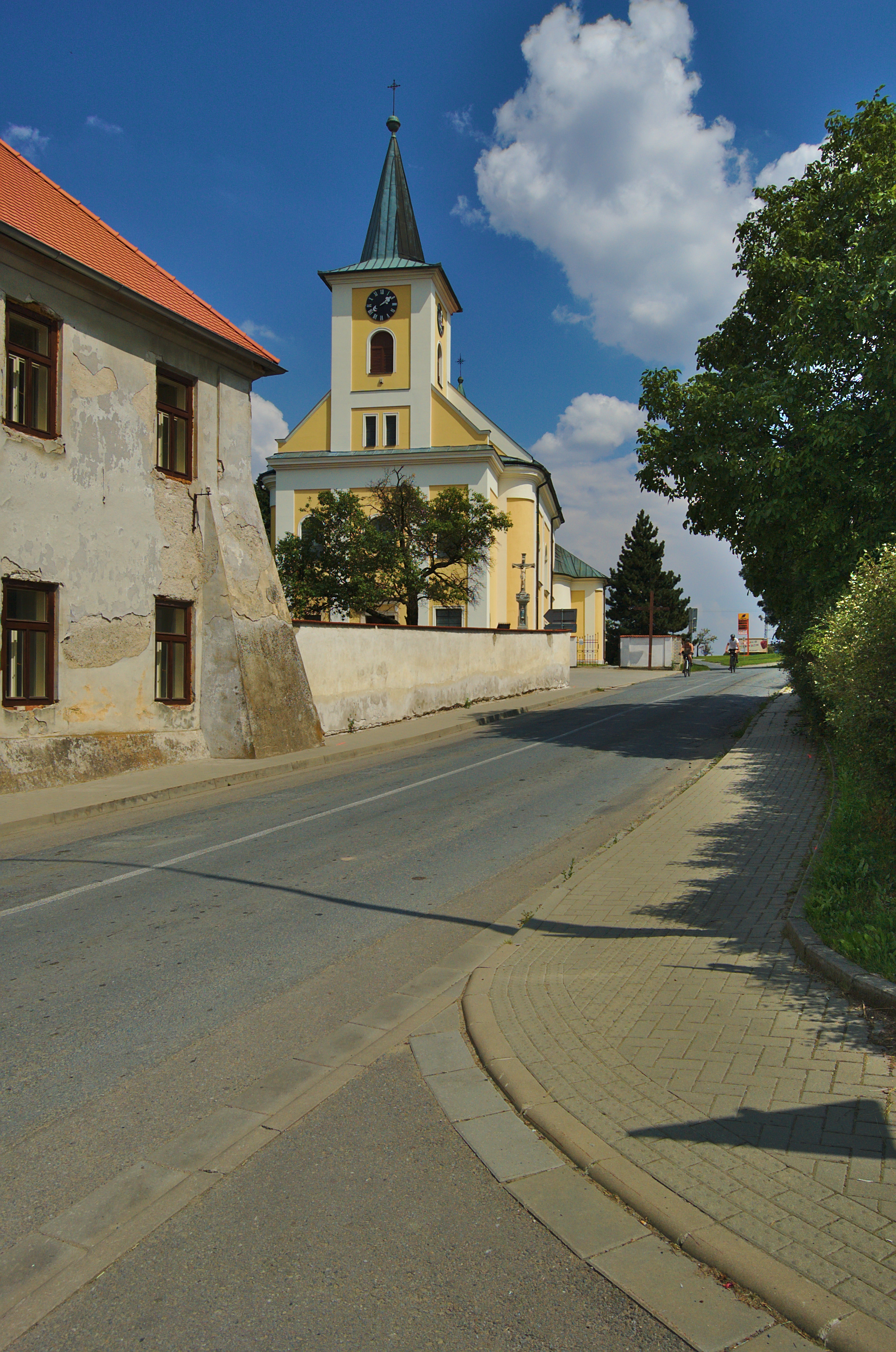 Kostel Narození Panny Marie, Protivanov, okres Prostějov